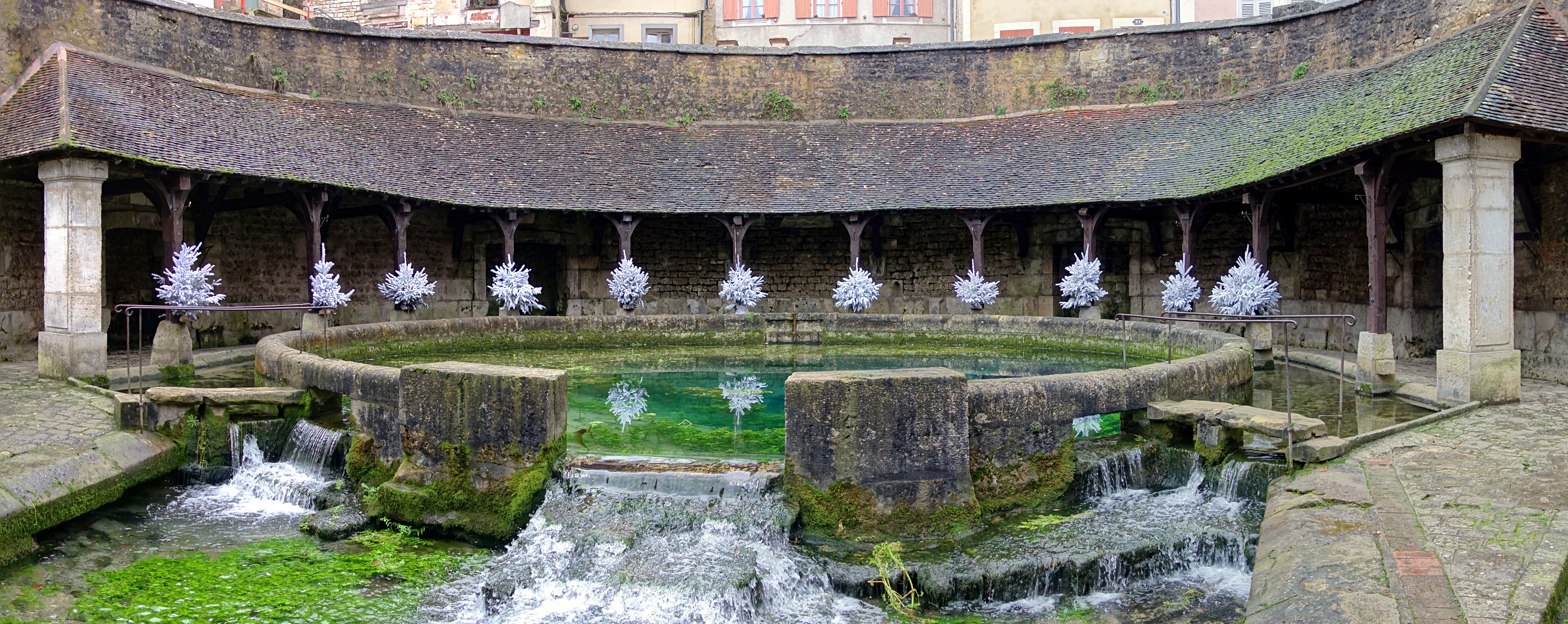 La Fosse Dionne à Tonnerre.